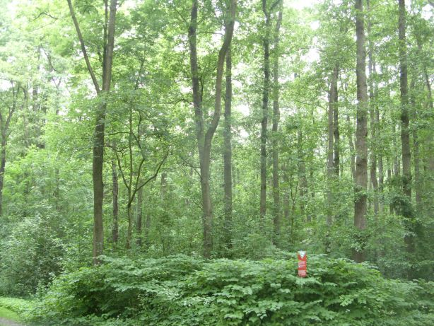 Naturschutzgebiet „Boltenmoor“